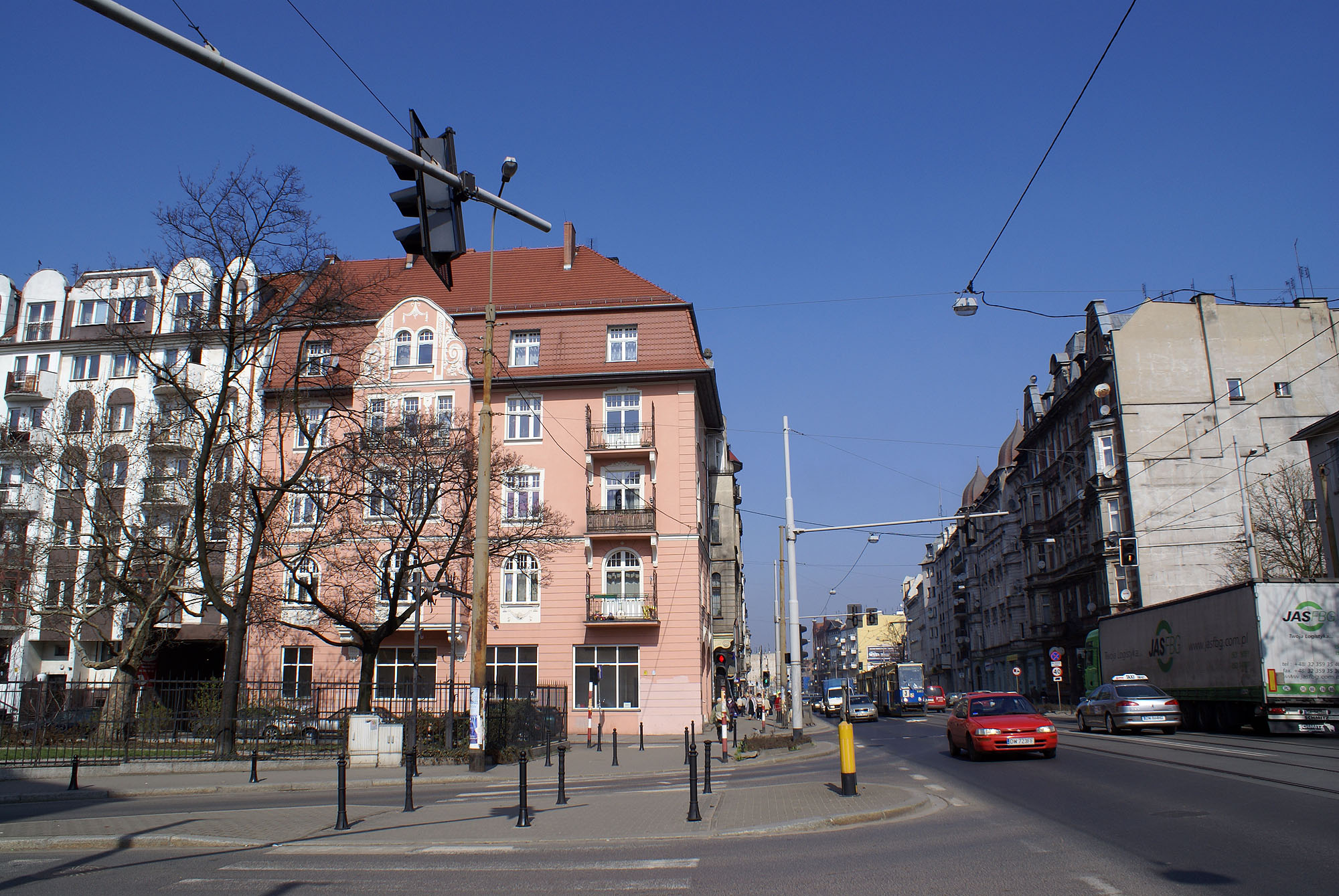 Wrocław, układ urbanistyczny Przedmieścia Oławskiego, XIII, XIX